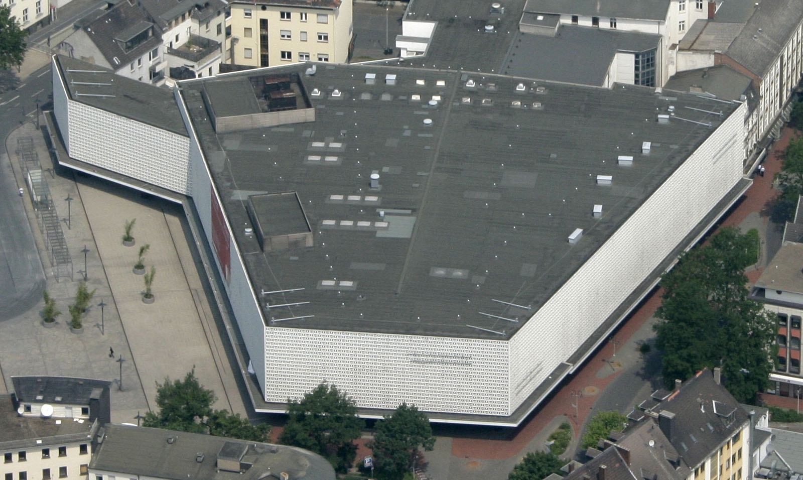 Luftbildaufnahme Horten Hamm